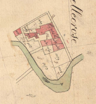 Vallcrosa de Baix en el Cadastre napoleònic del 1812 (Arxius Departamentals dels Pirineus Orientals)